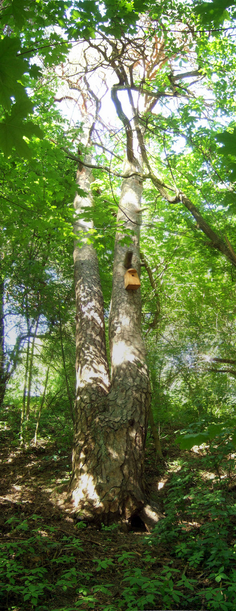 Kalnų parko pušis, gamtos paveldo objektas